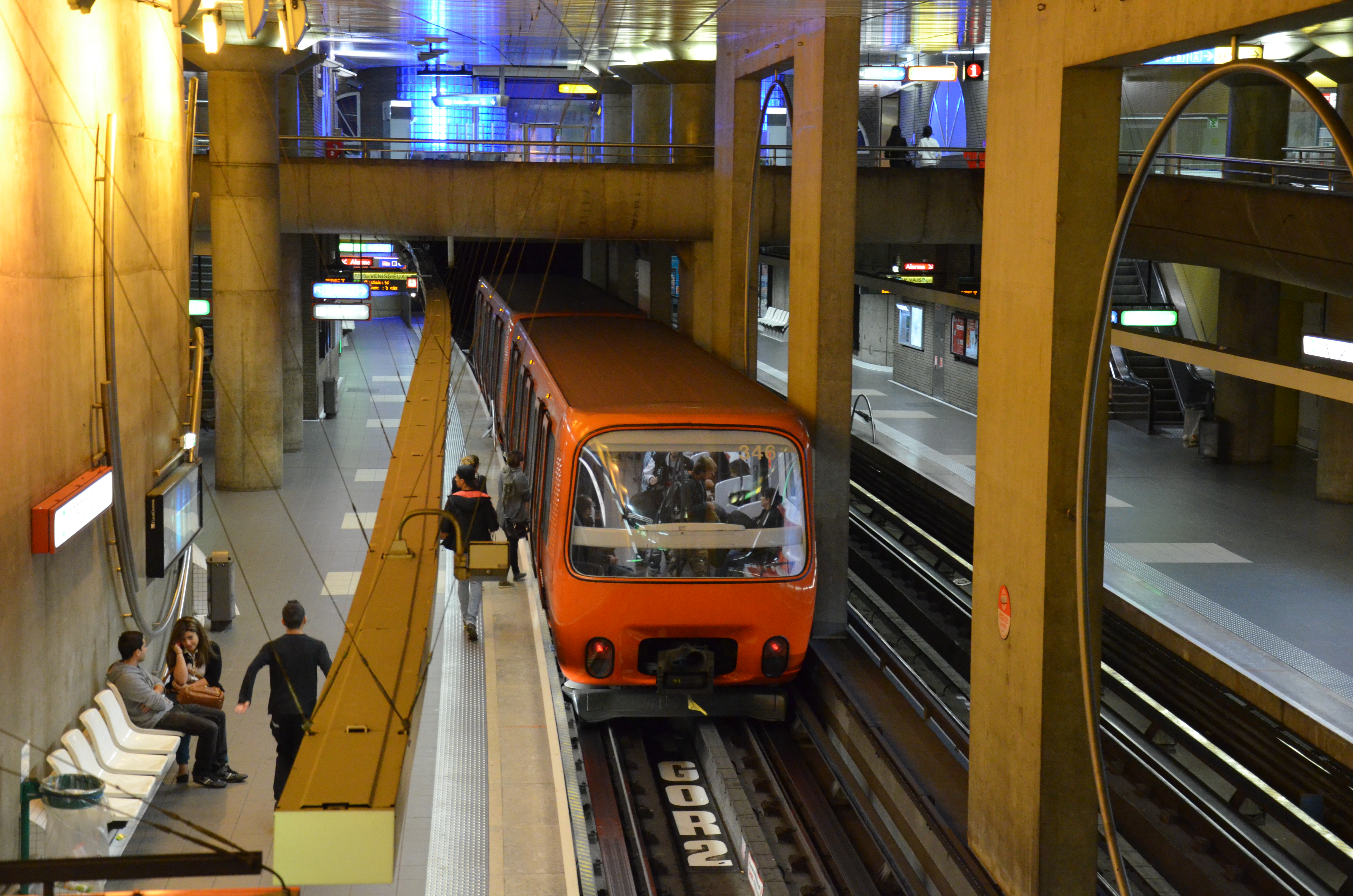 Rame 346 à la station Gorge du Loup sur la ligne D du métro de Lyon, France